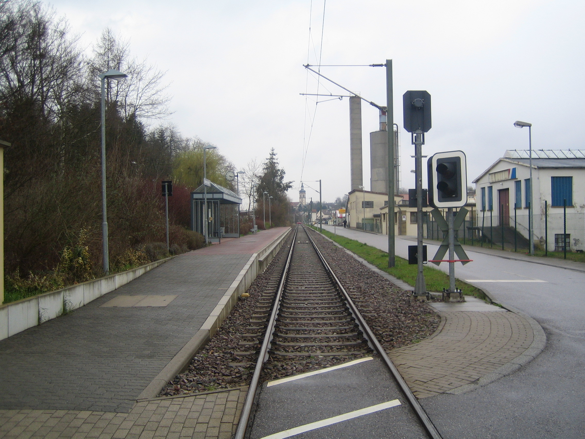 Hp. "Odenheim West", selbst fotografiert